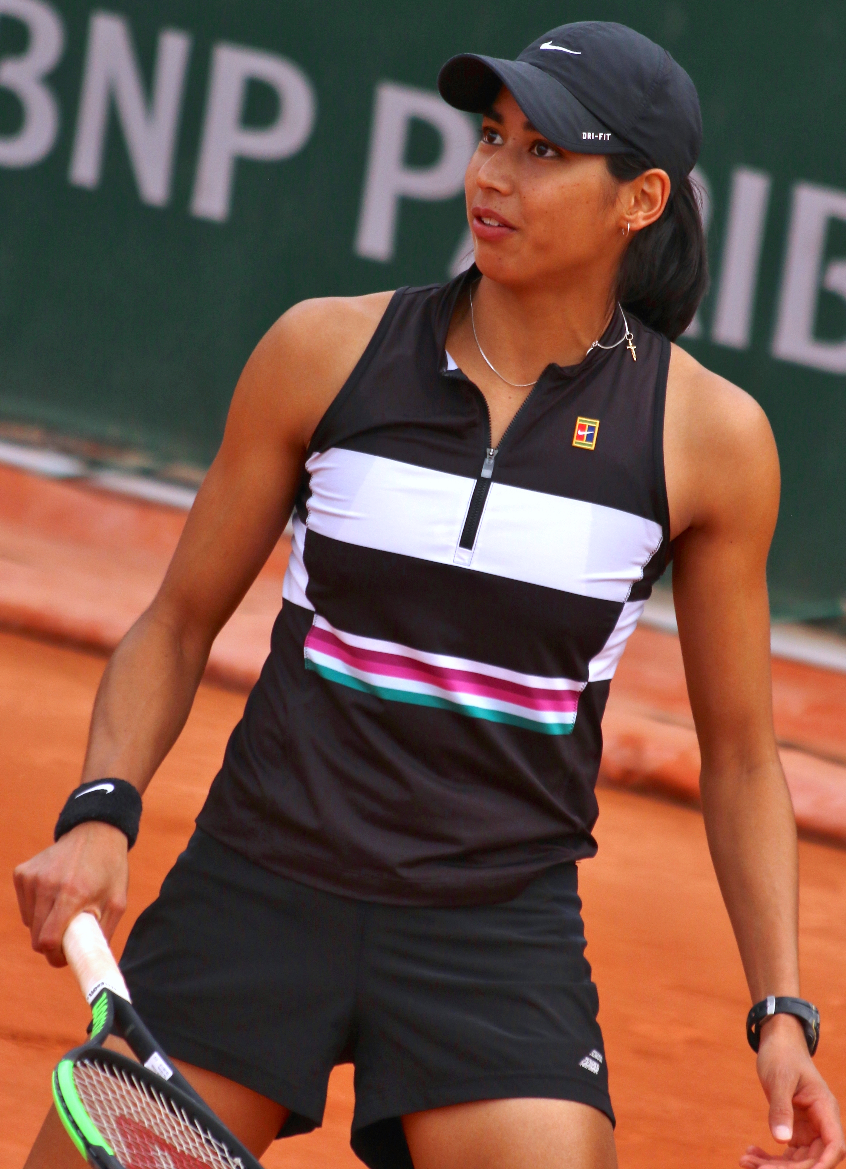 Sharma RG19 (11)